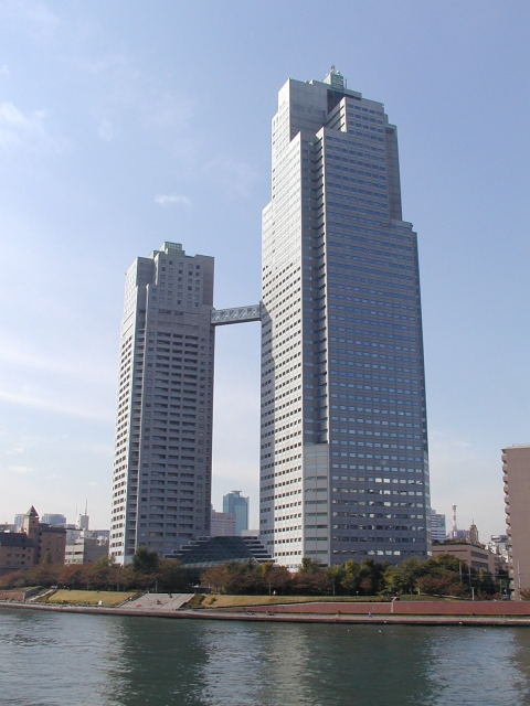 対岸から見た聖路加ガーデン